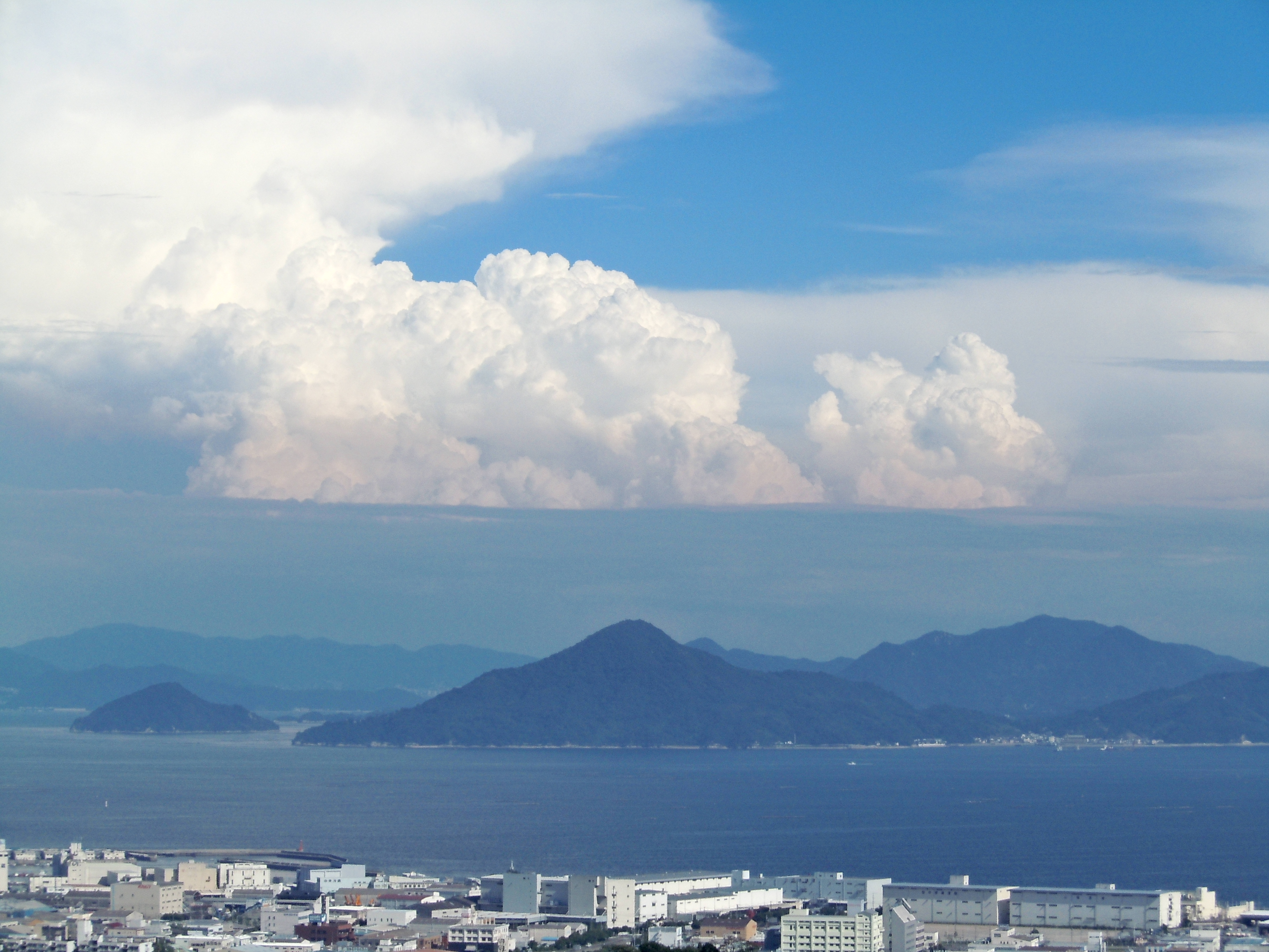 井口台三丁目からの眺め